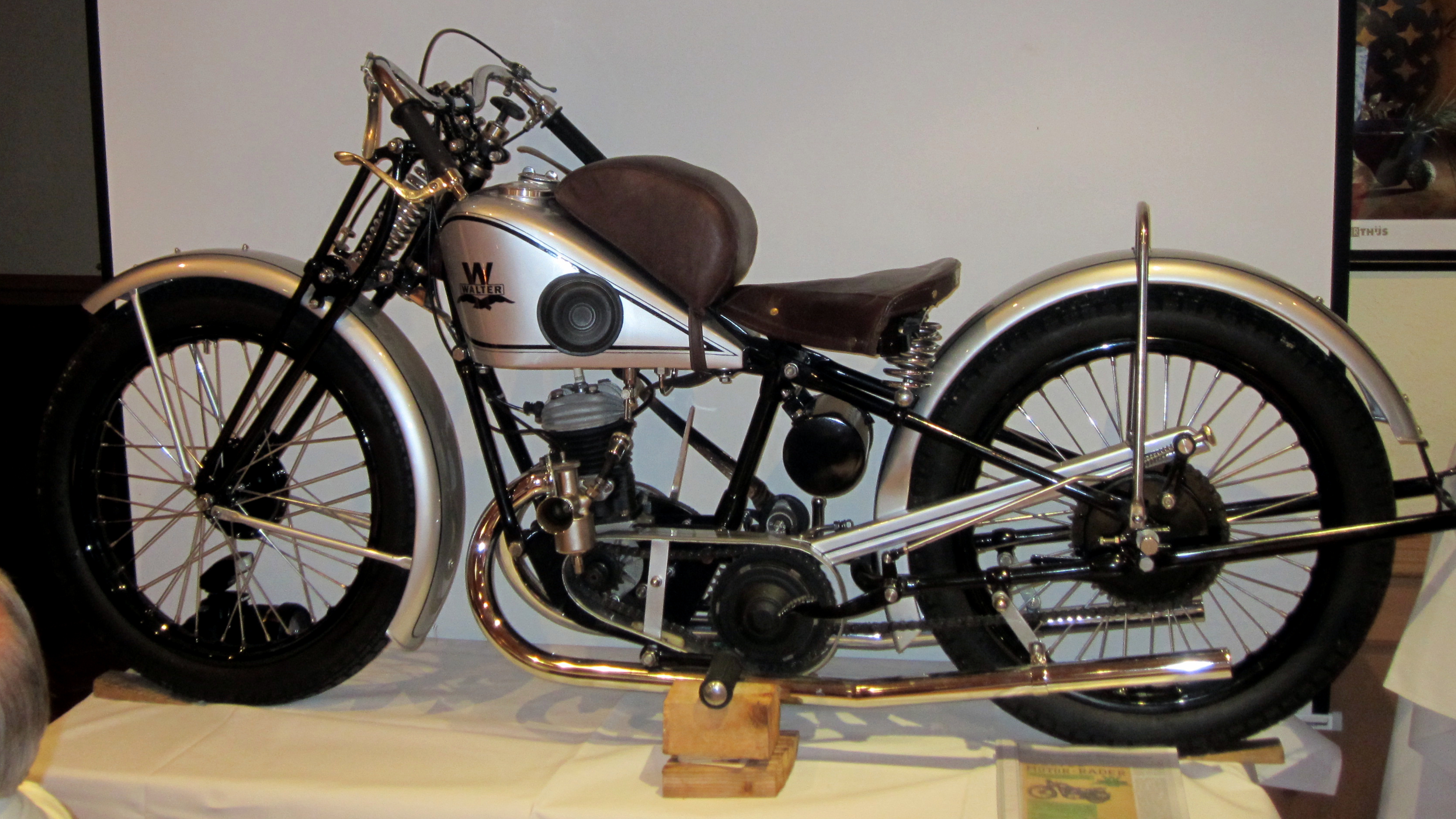 Walter 175 ccm Supersportmaschine